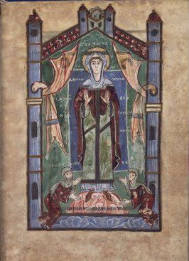 p.17r des Evangeliars der Essener Äbtissin Svanhild (1058-1085), heute in der John Rylands Library, Manchester (MS. Latin 110). Das Bild zeigt Suanhild und die Mitstifterin Brigitta, die das Buch der stehenden Gottesmutter Maria darbringen.